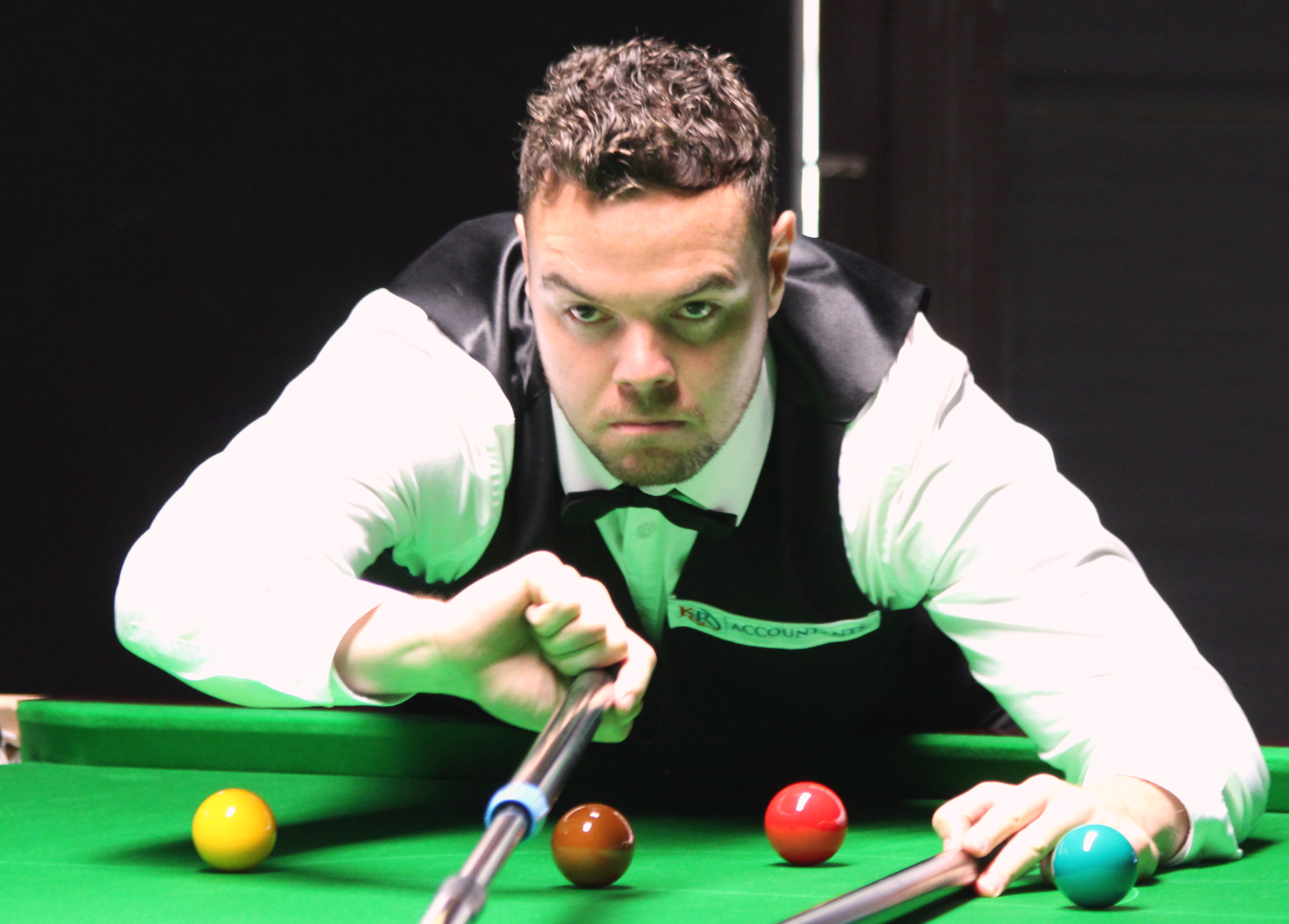 Jamie Cope beim Paul Hunter Classic 2016